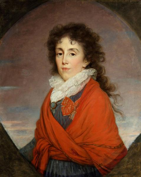 Ekaterina I. Kutuzova, wife of russian field marshal M.I. Kutuzov. Portrait by Elizabed Vije-Lebren. Museum in Uglich (Russia). Из фондов Угличского историко-художественного музея.